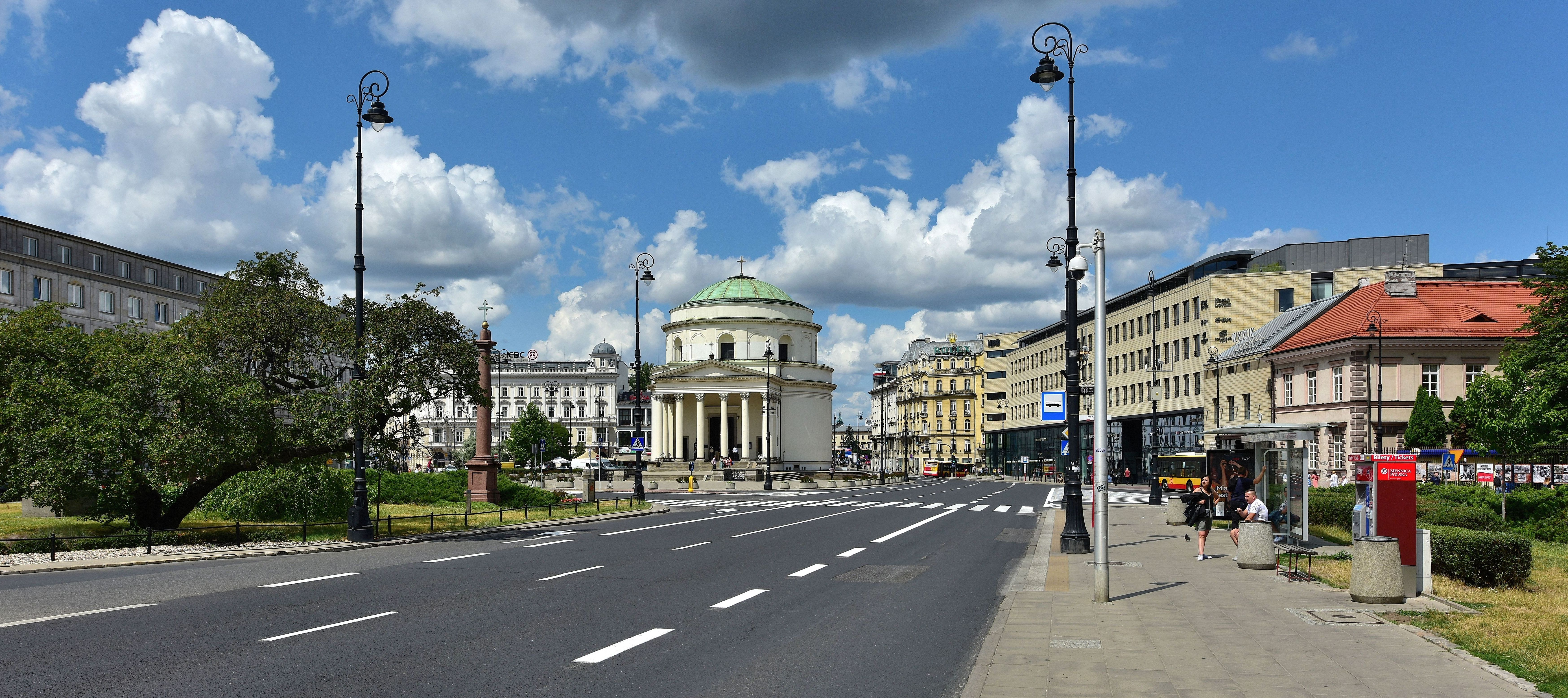 Plac Trzech Krzyży w Warszawie